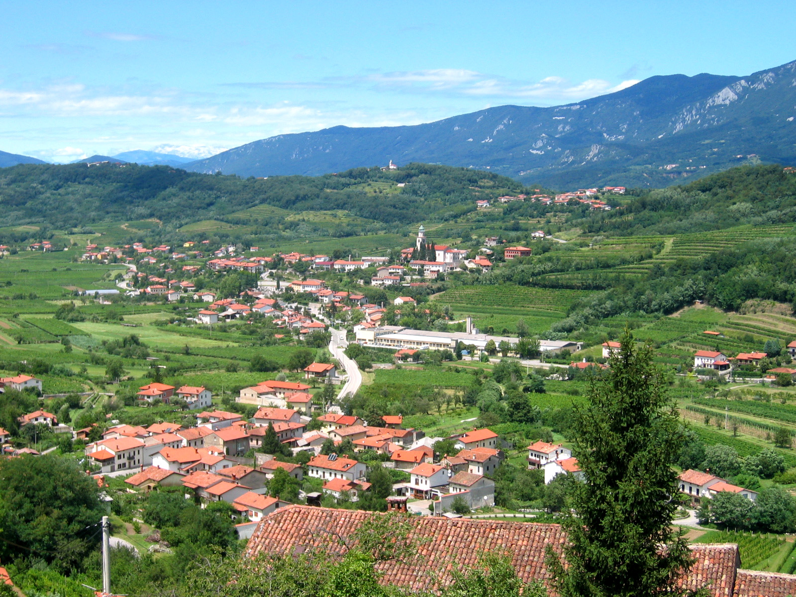 Branik, village in Slovenia